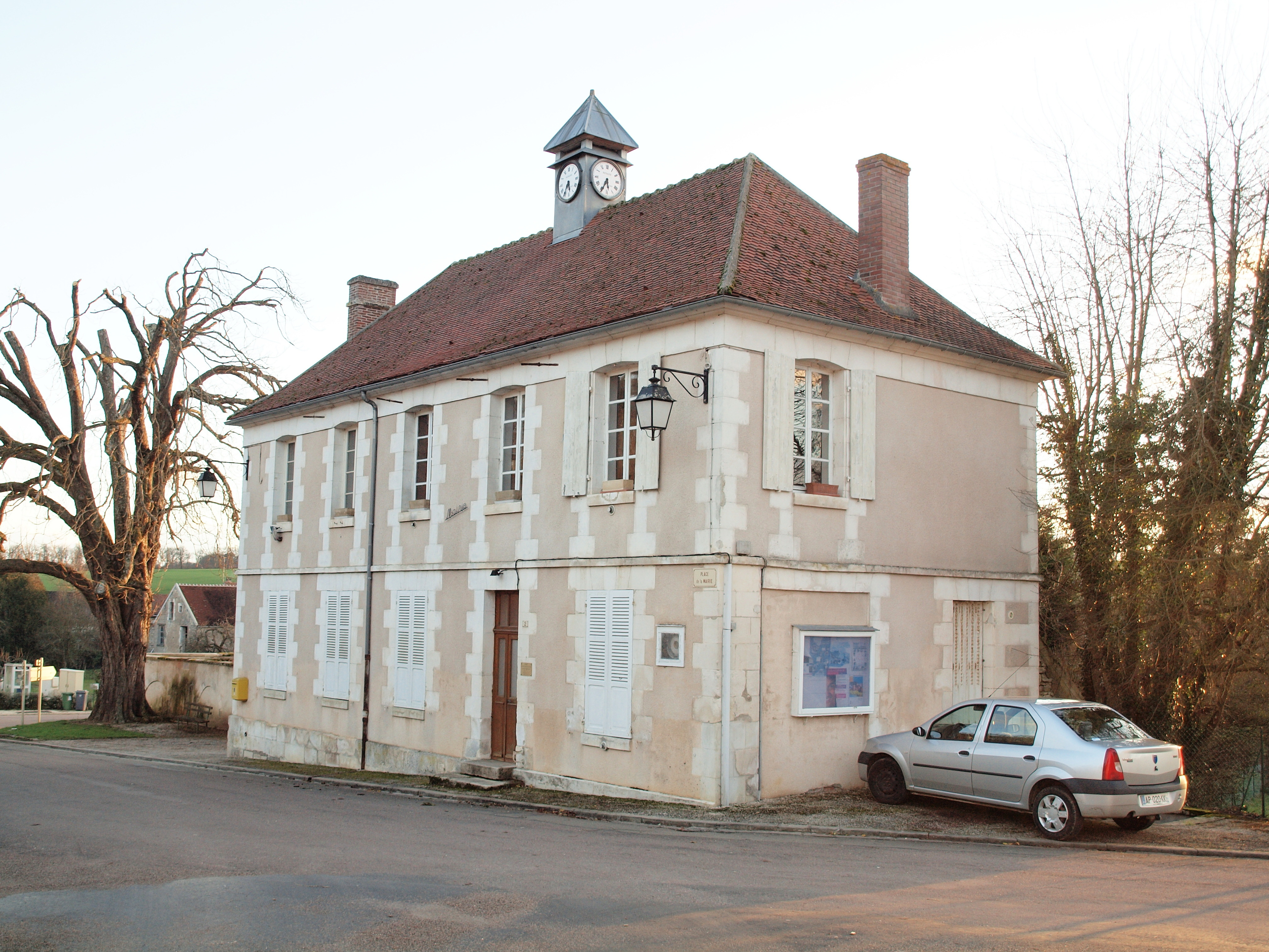 Fontenay-sous-Fouronnes (Yonne, Nièvre)